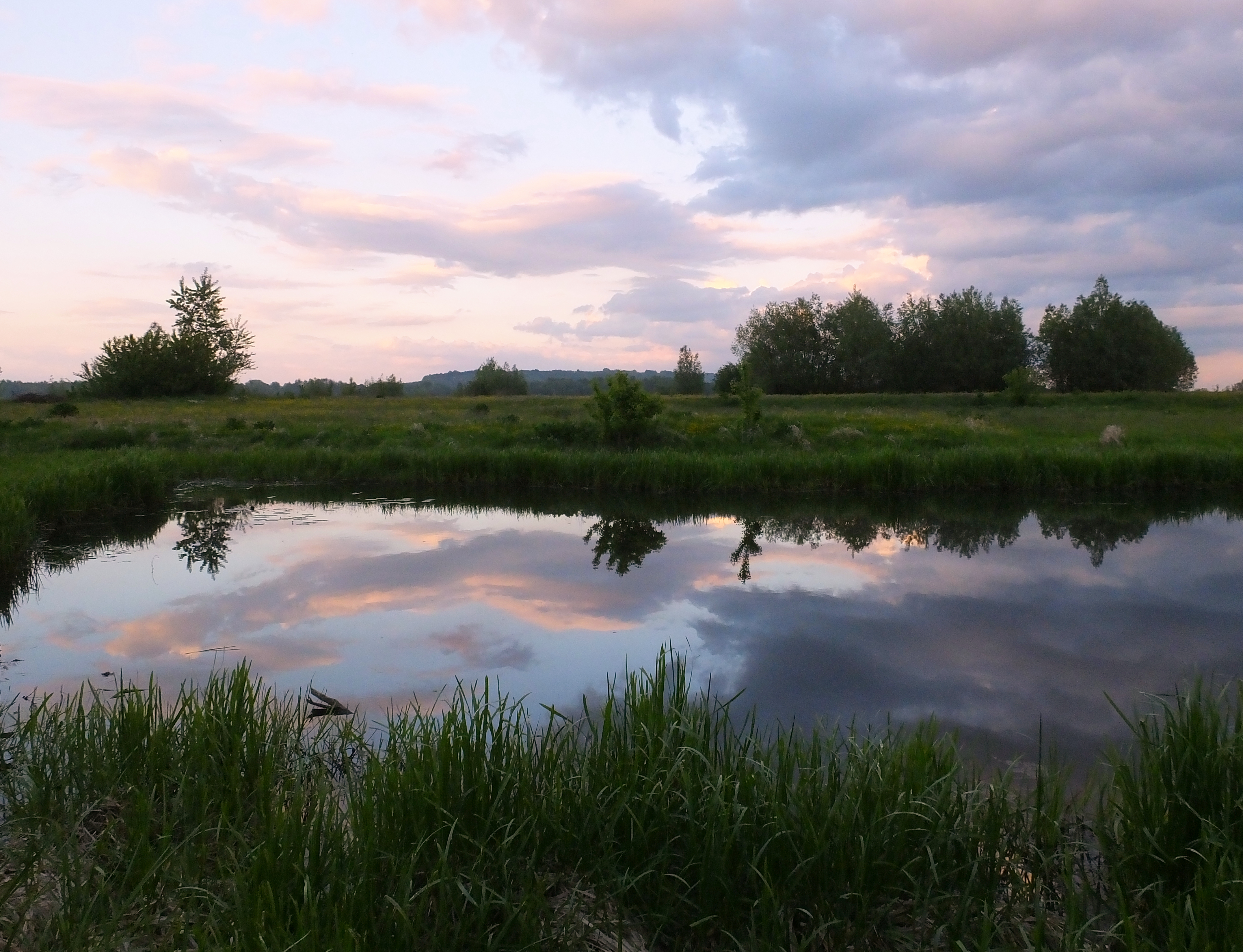 Wały przeciwpowodziowe w Brześcach i łąki w międzywalu oraz starorzecze Wisły. Obszar specjalnej ochrony ptaków Małopolski Przełom Wisły, specjalny obszar ochrony siedlisk Przełom Wisły w Małopolsce i Kazimierski Park Krajobrazowy This is a photography of Natura 2000 protected area with ID PLB140006